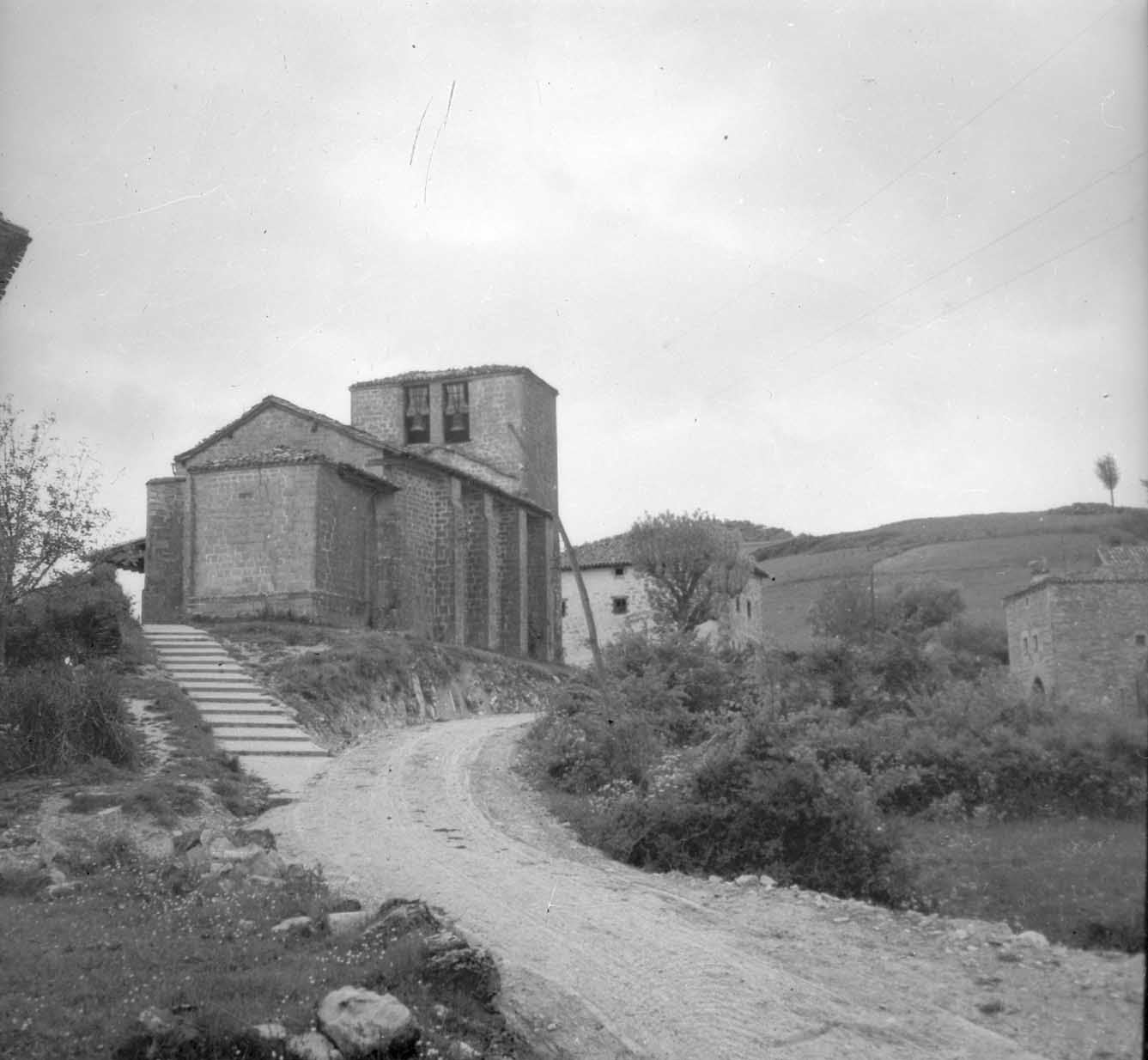 Atetzko eliza.